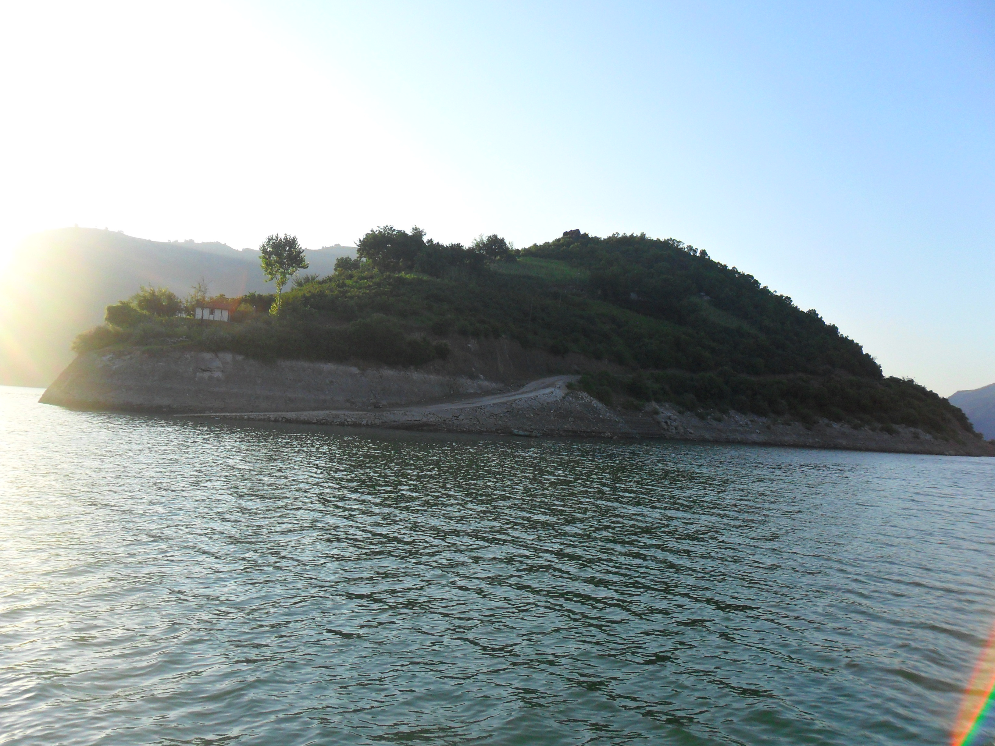 Almus baraj gölünde yer alan bir adacık.